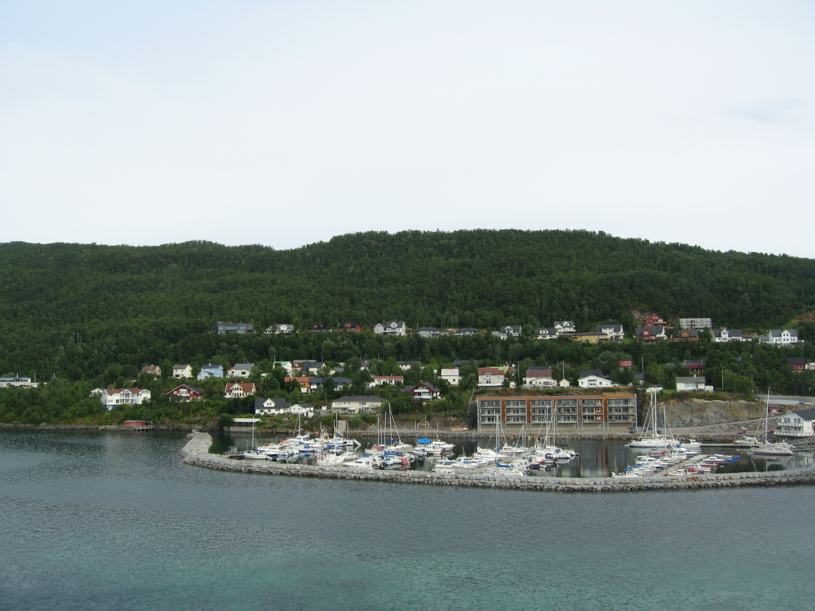 Nordre Nygård sett fra Gisundbrua